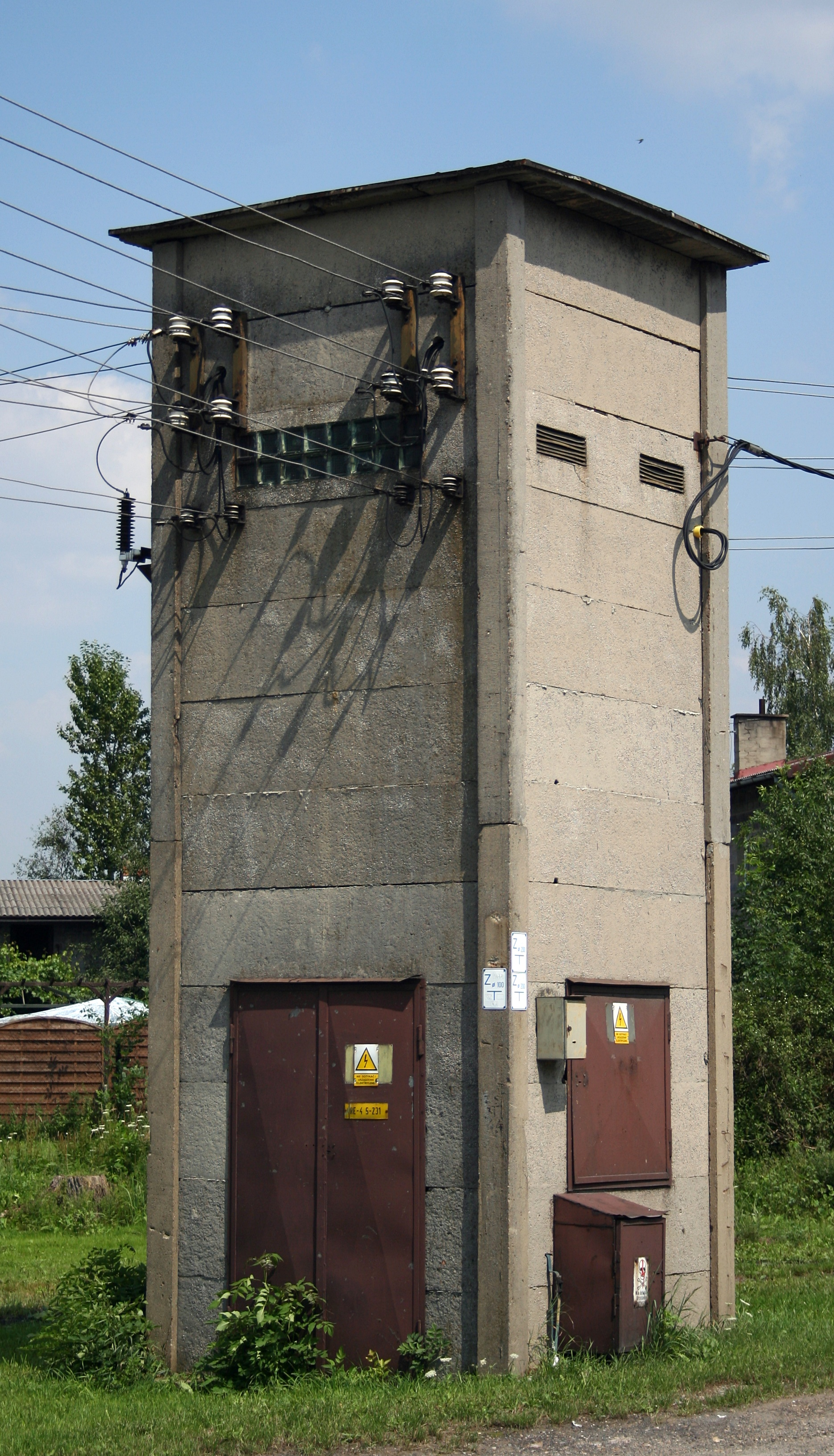 Transformator we wsi Wola Hankowska, gmina Mykanów, woj. śląskie.